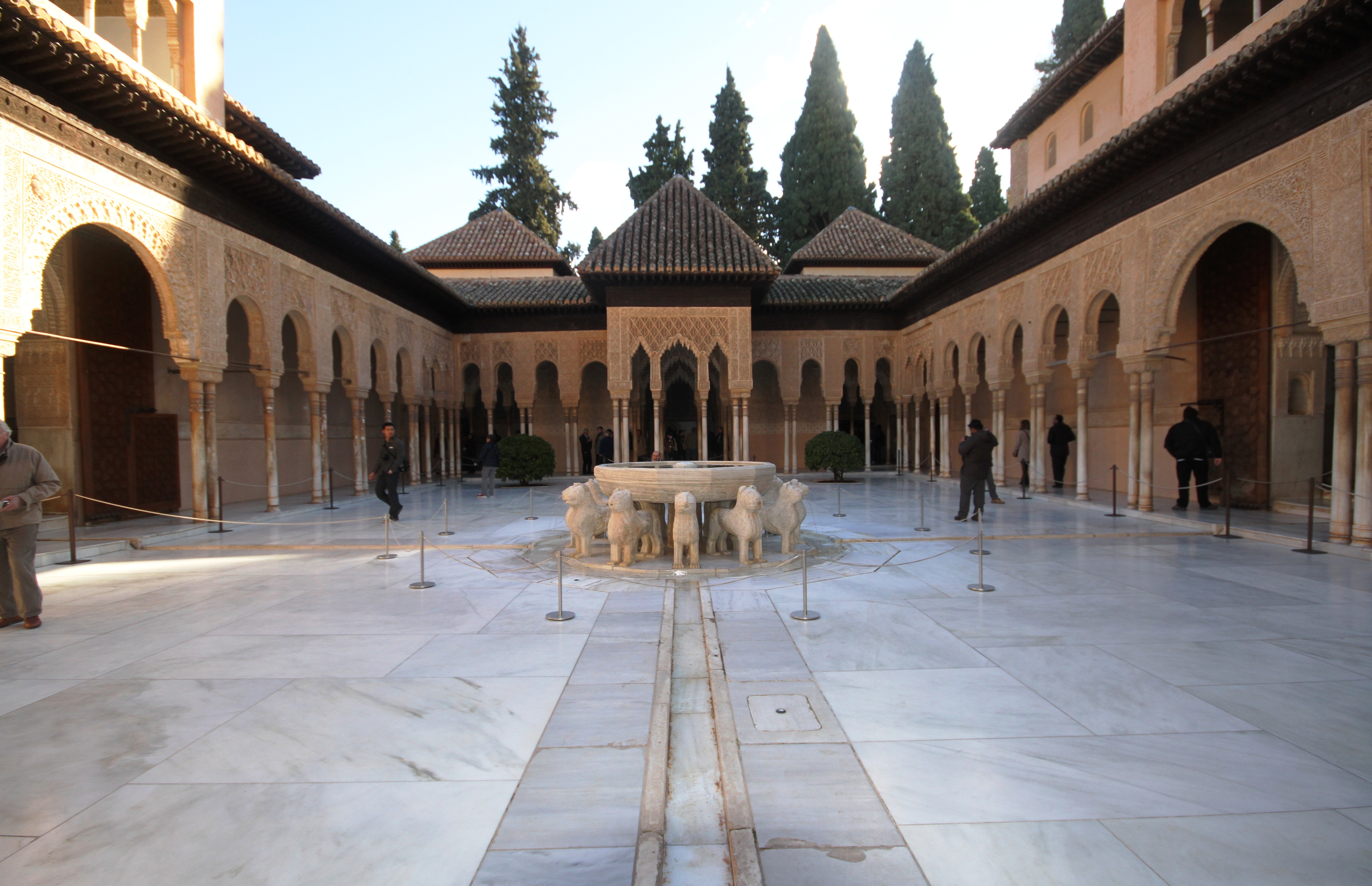 Pátio